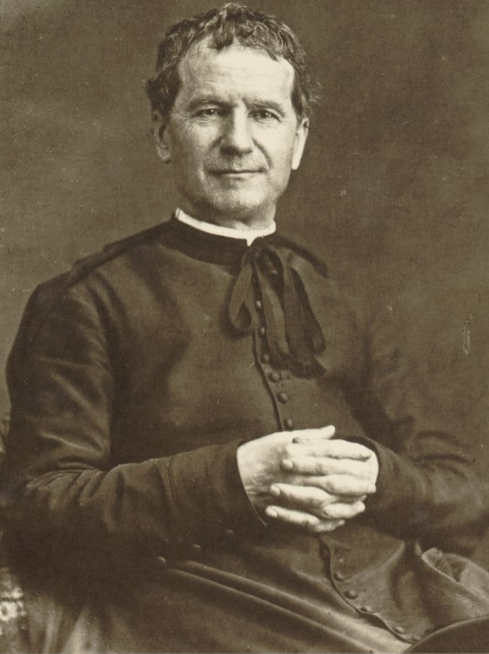 Don Bosco la Torino în 1880 (fotografie originală).